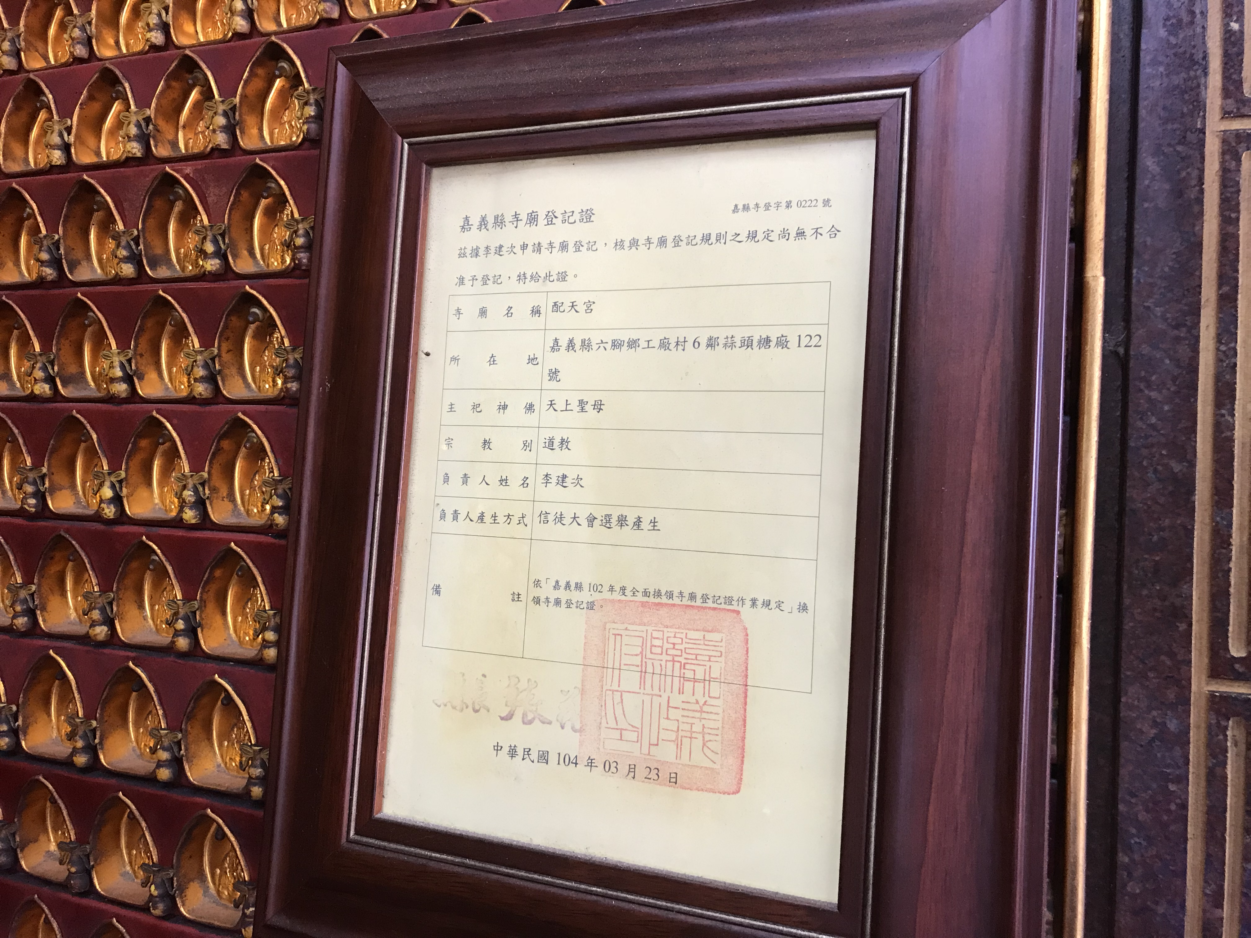 糖廠配天宮嘉義縣寺廟登記證 嘉義縣政府發